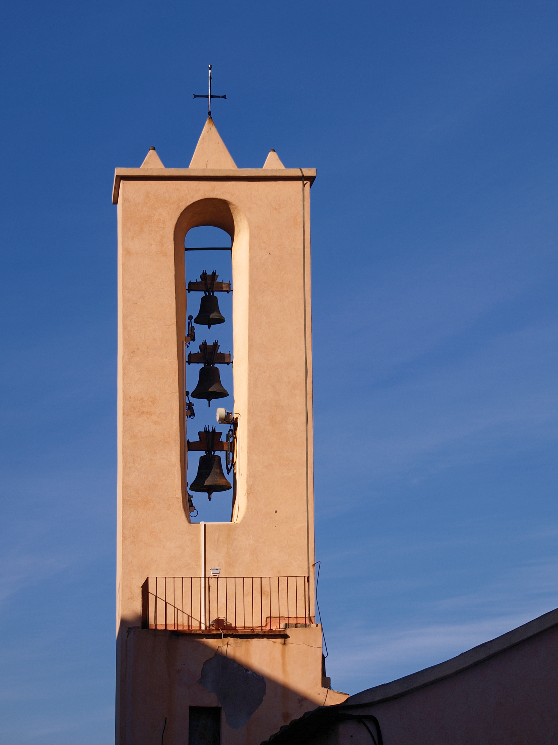 Monticello, Balagne (Haute-Corse) - Clocher de l'église San Sebastianu